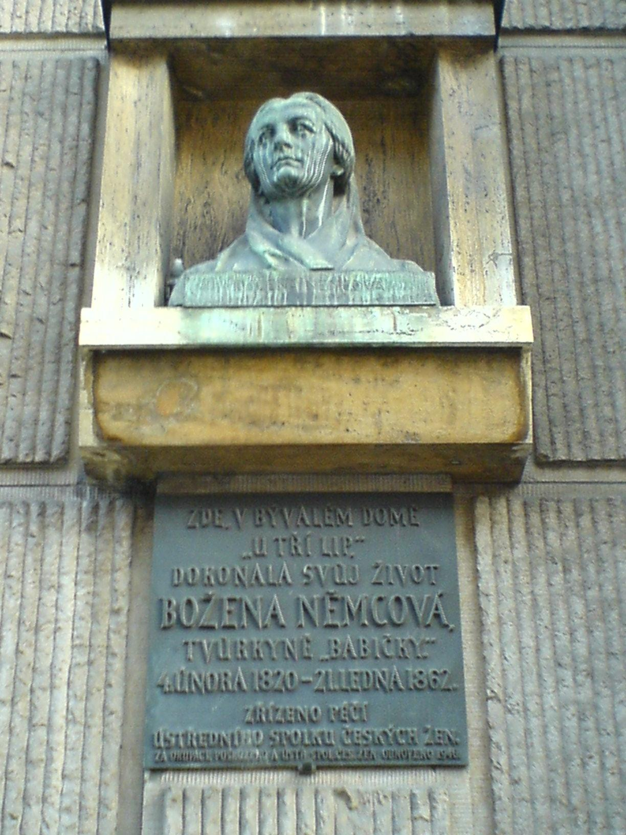 Pamětní deska Boženy Němcové, Praha-Nové Město, ulice Na Příkopě 854/14. The format of the ID indicates a movable monument. Formát rejstříkového čísla odpovídá movité památce.